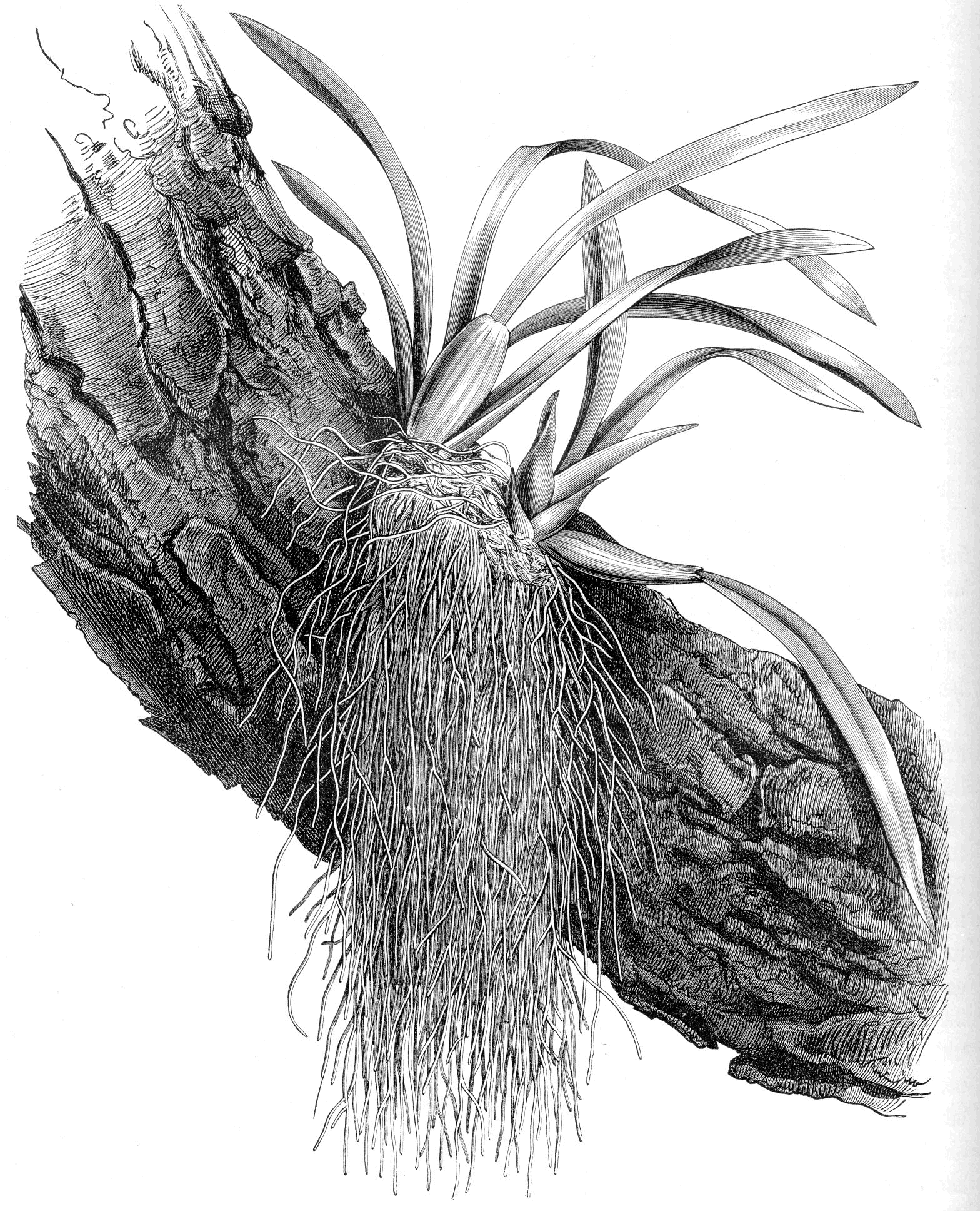 Orkidé med luftrötter, fäst på barken av en trädgren